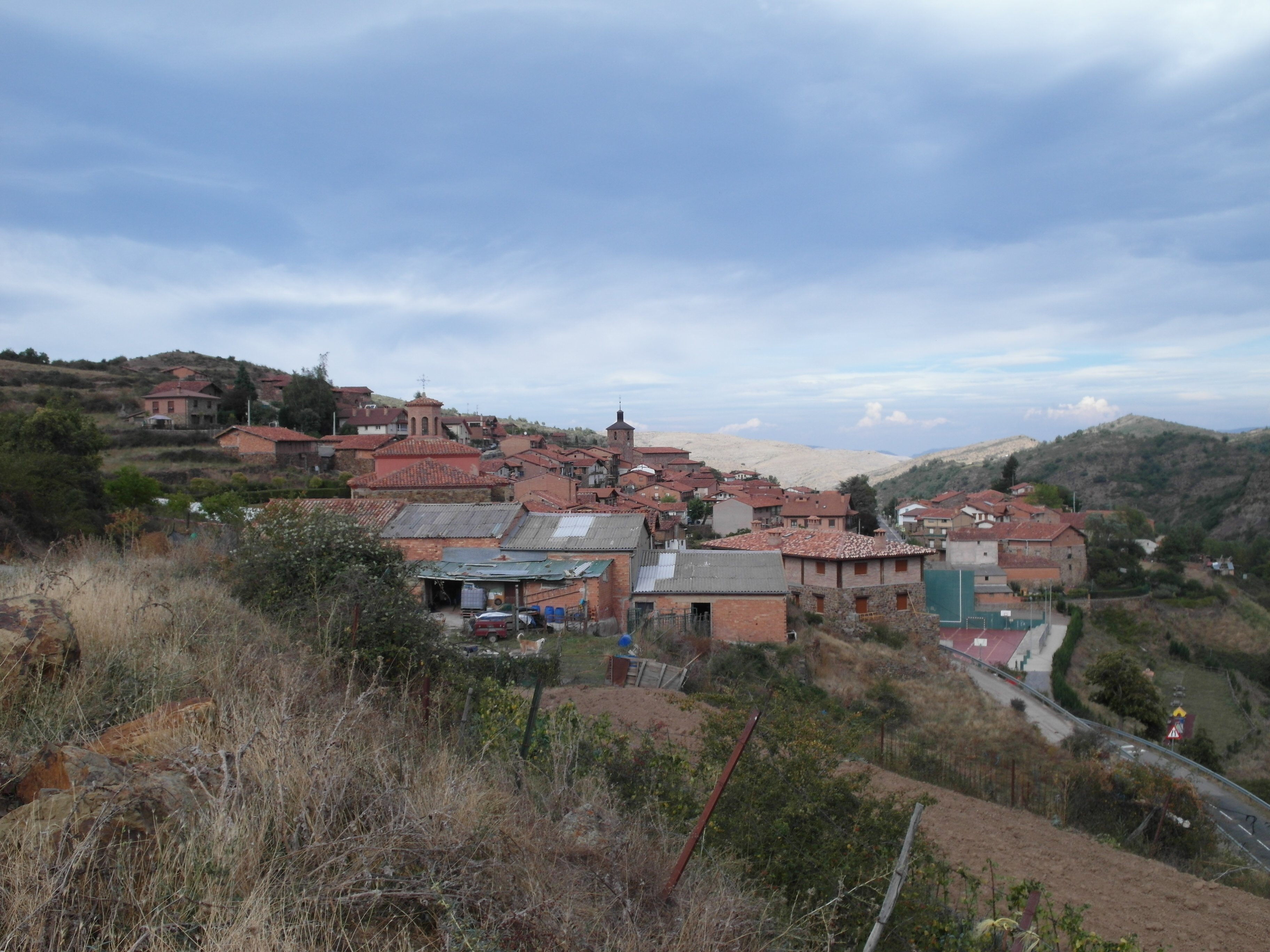 Laguna de Cameros, La Rioja.